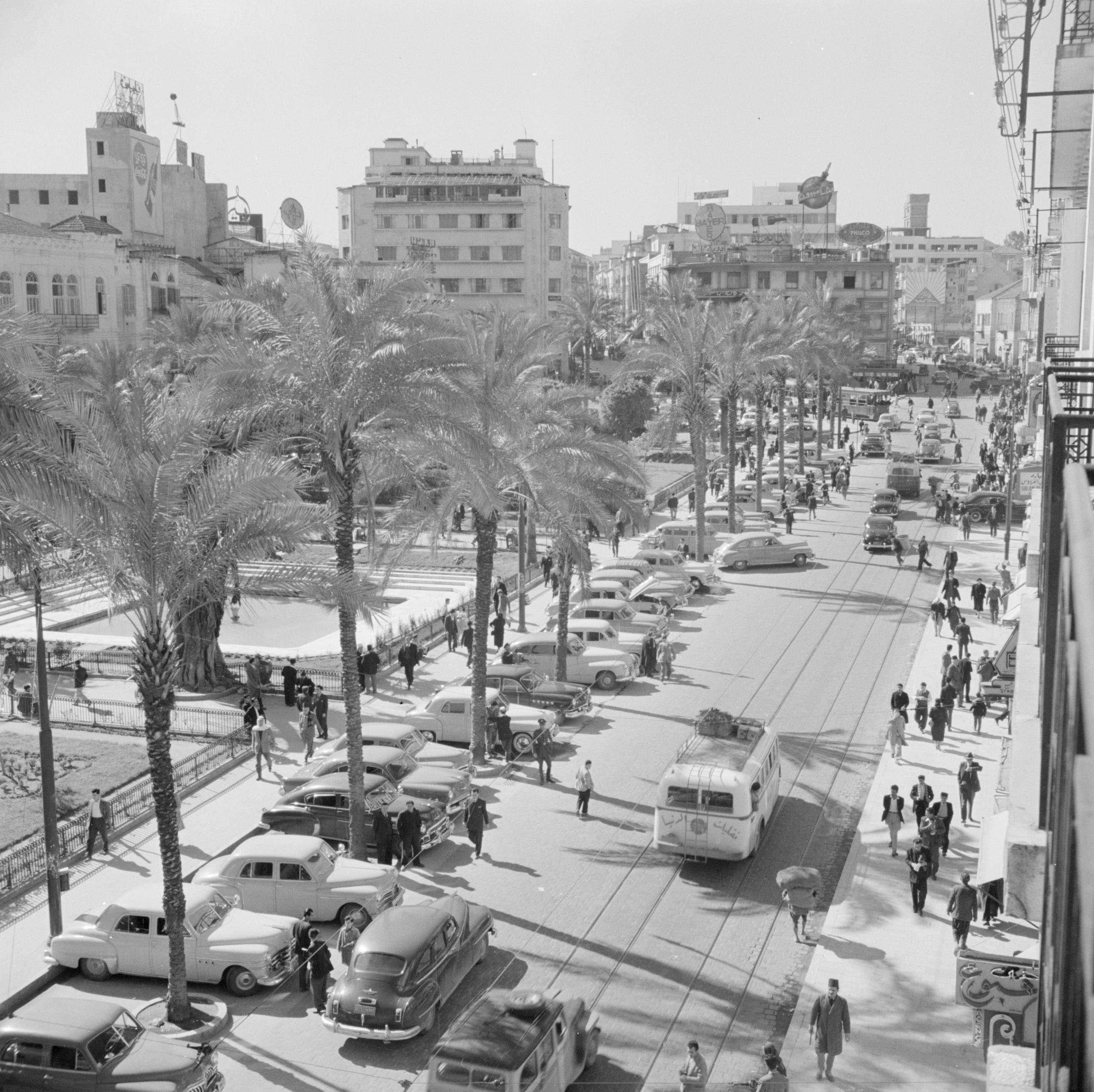 Collectie / Archief : Fotocollectie Van de Poll Reportage / Serie : Midden-Oosten 1950-1955: Libanon Beschrijving : Straatbeeld in Beiroet Annotatie : Zicht op het plein van de martelaren Datum : 1950 Locatie : Beiroet, Libanon Trefwoorden : auto's, straatbeelden, voetgangers Fotograaf : Poll, Willem van de Auteursrechthebbende : Nationaal Archief Materiaalsoort : Negatief (zwart/wit) Nummer archiefinventaris : bekijk toegang 2.24.14.02 Bestanddeelnummer : 255-6176